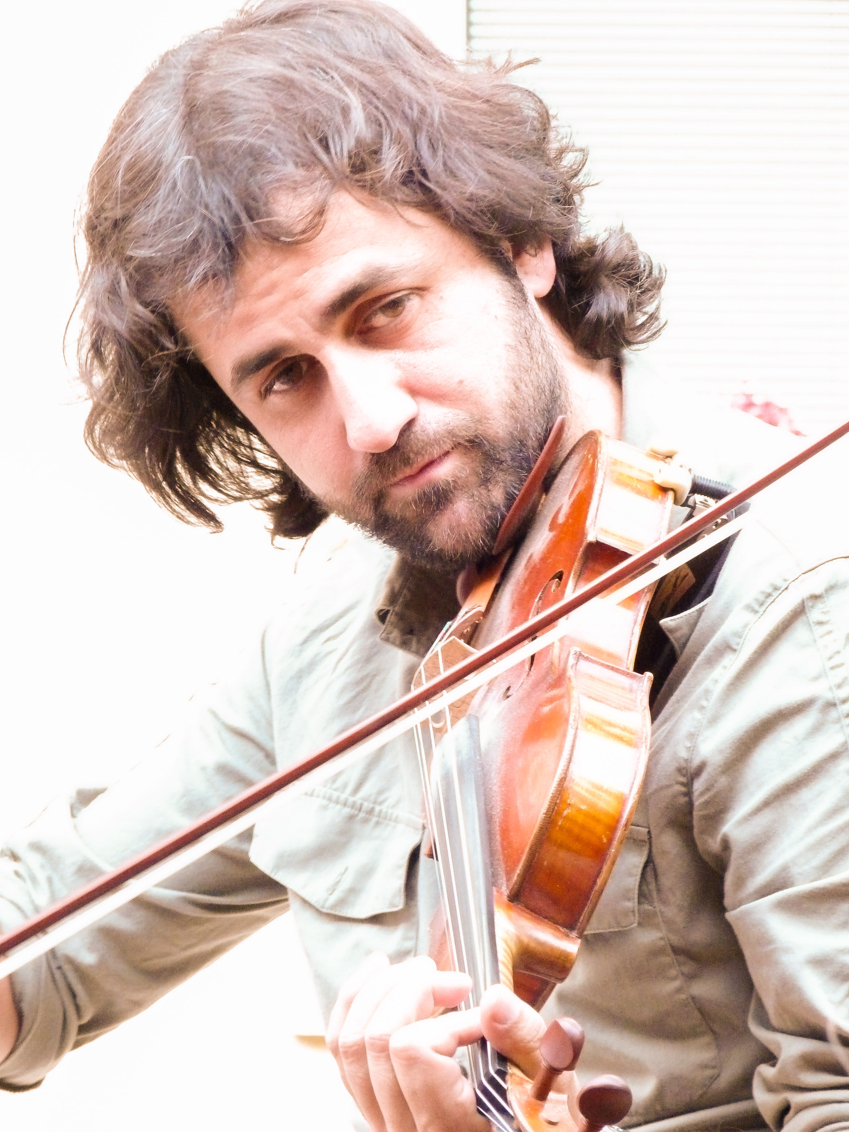 El violinista Diego Galaz tocando el violín